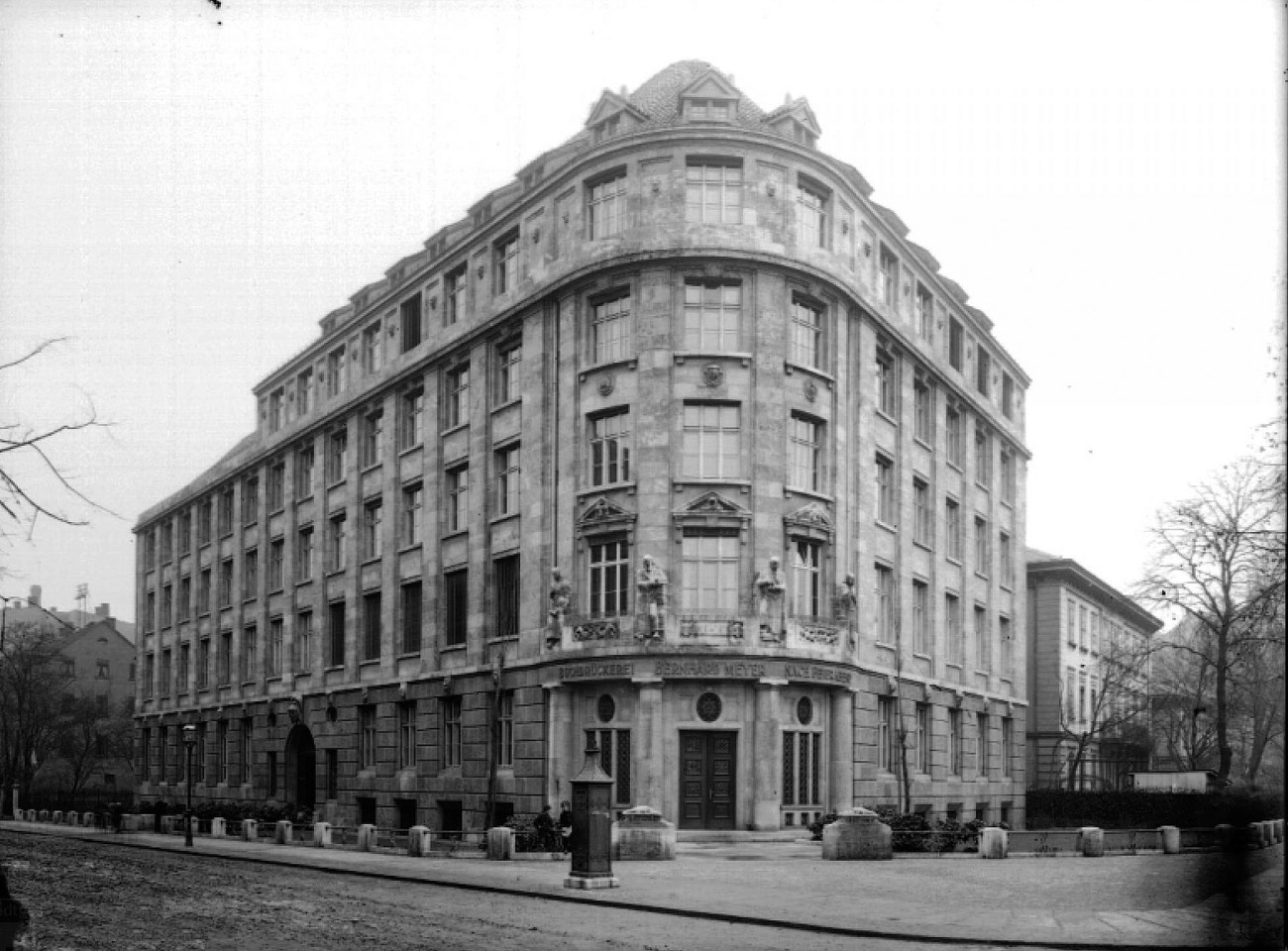 Leipzig: Buchdruckerei Bernhard Meyer, Dresdner Straße 1, Ecke Salomonstraße